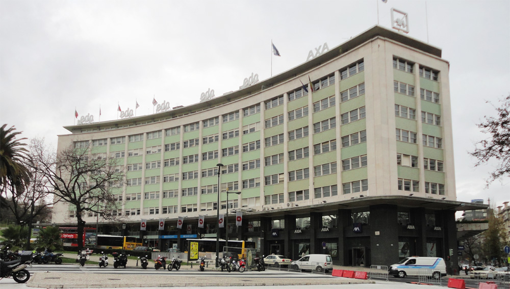 Praça Marquês de Pombal, Lisboa; Arq. Carlos Ramos